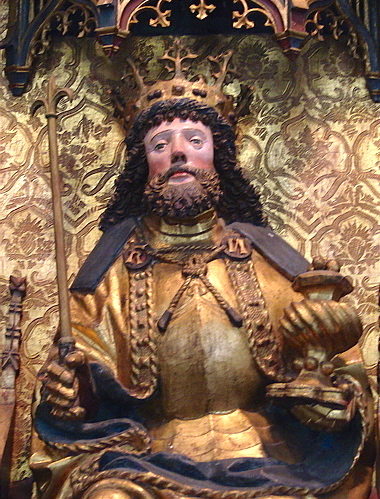 Knud den Hellige, altertavle stammende fra Skt. Peders Kirke i Næstved, nu i Nationalmuséet, København